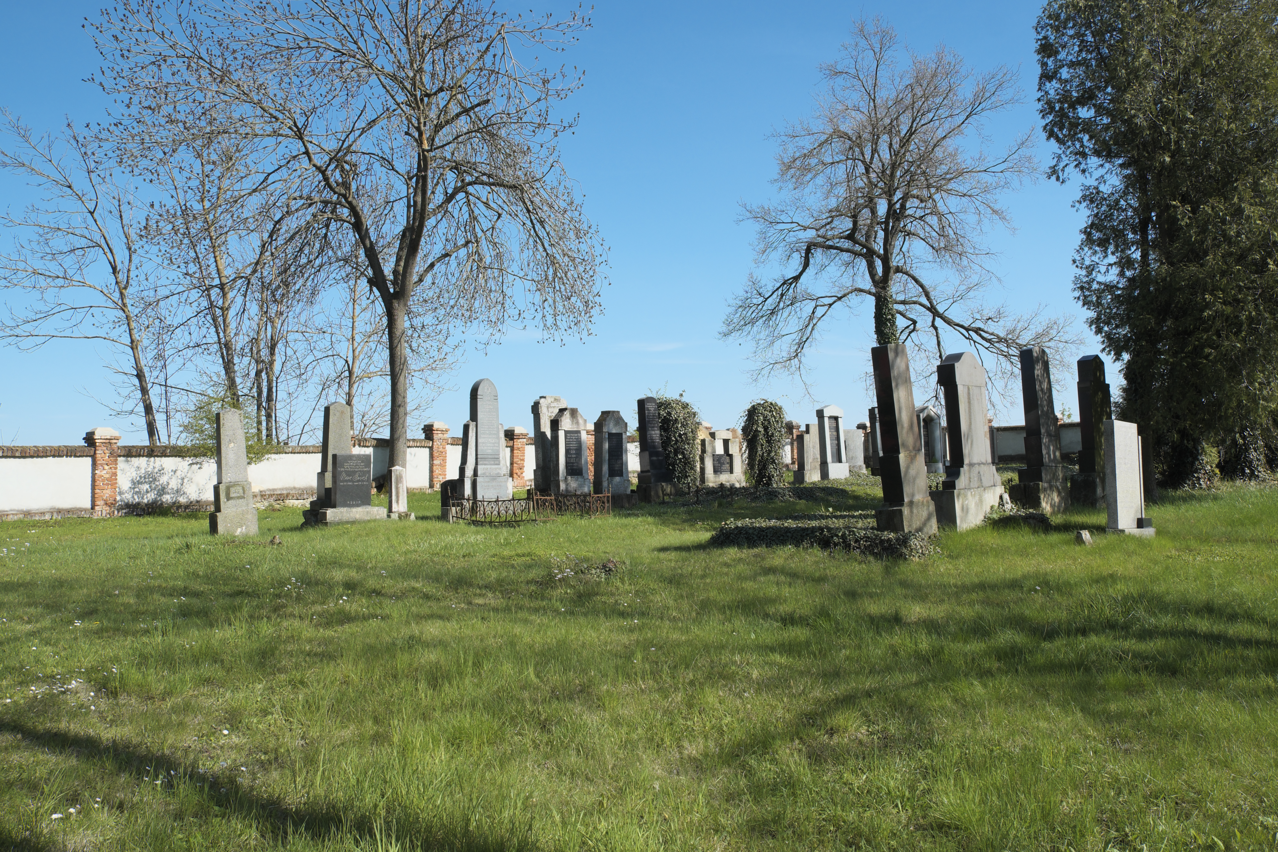 Jüdischer Friedhof (Moravské Budějovice) in Moravské Budějovice im Okres Třebíč in der Region Hochland (Kraj Vysočina) in Tschechien